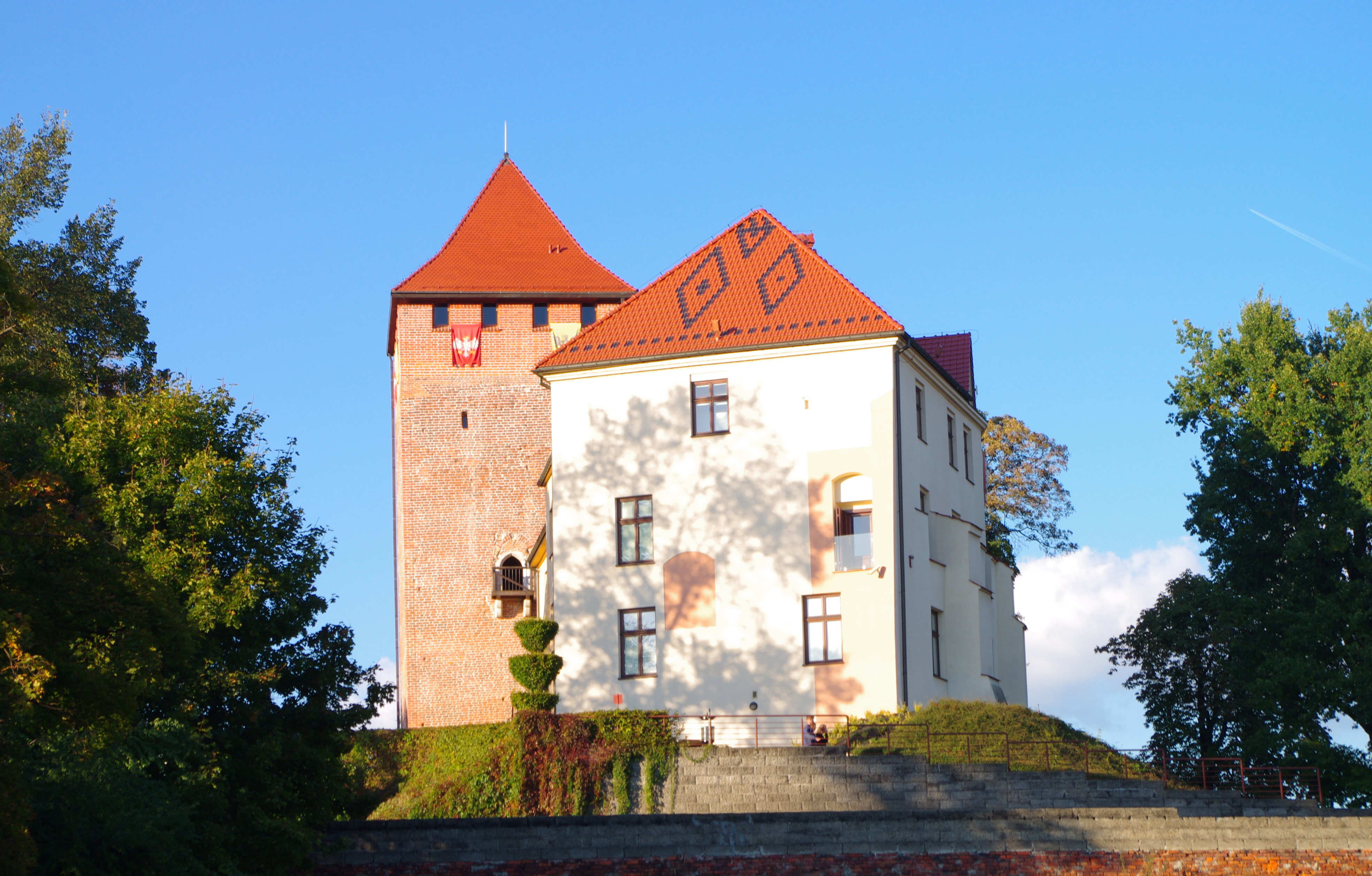 Oświęcim, zamek, ob. muzeum, 2 poł. XIII, XIV, XIX